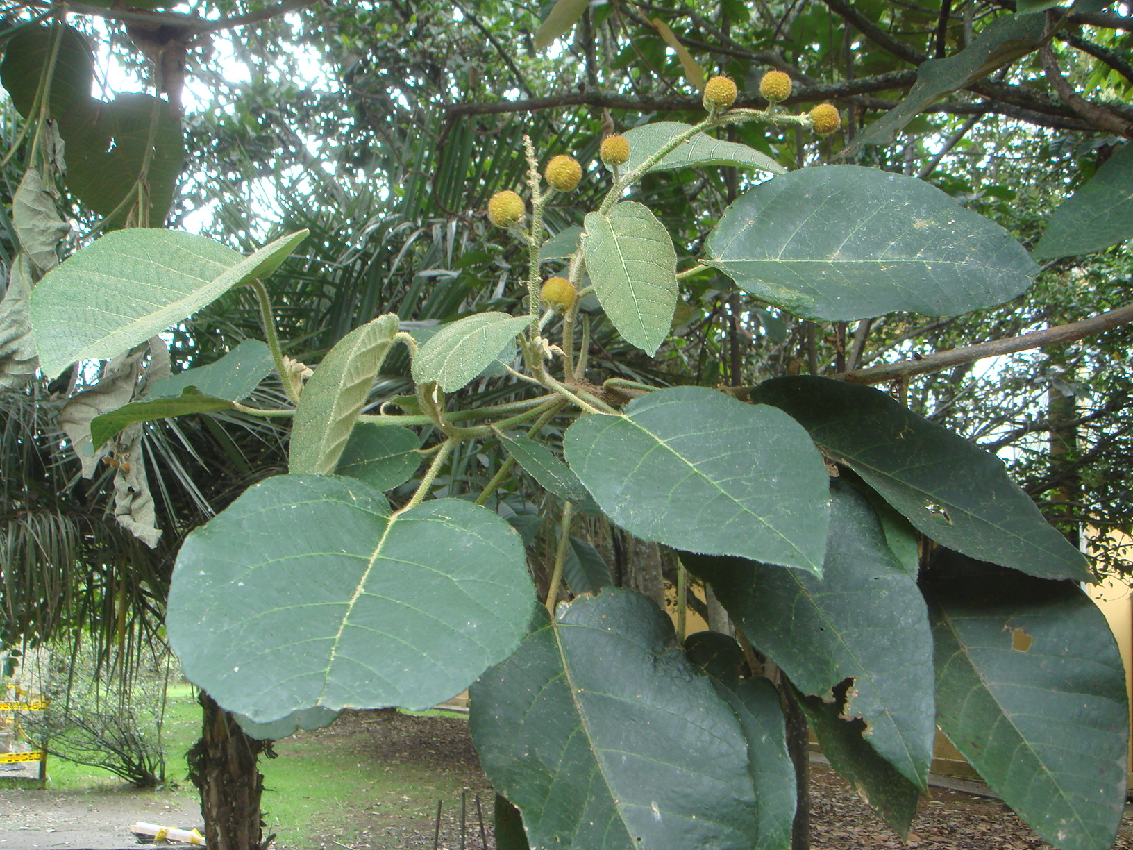 Drago (Croton magdalenensis), Jardín Botánico de Bogotá, Colombia.